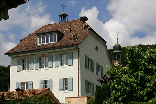 Gemeindeverwaltung in Nenzlingen